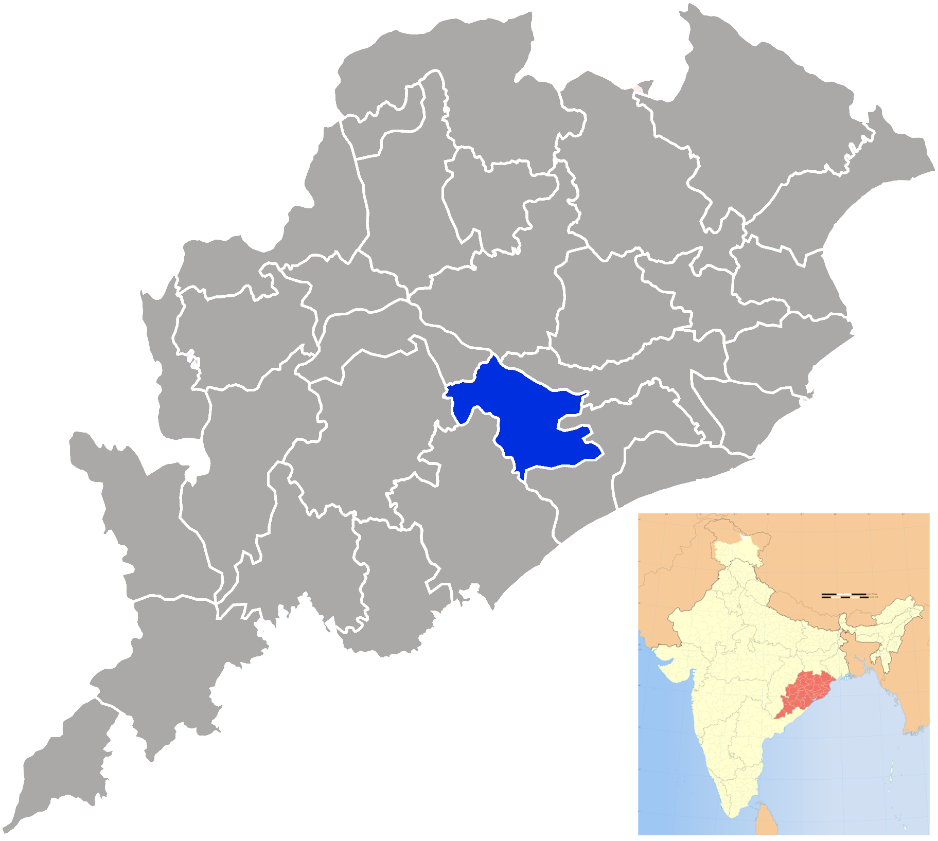 Distrito de Nayagarh en Orissa